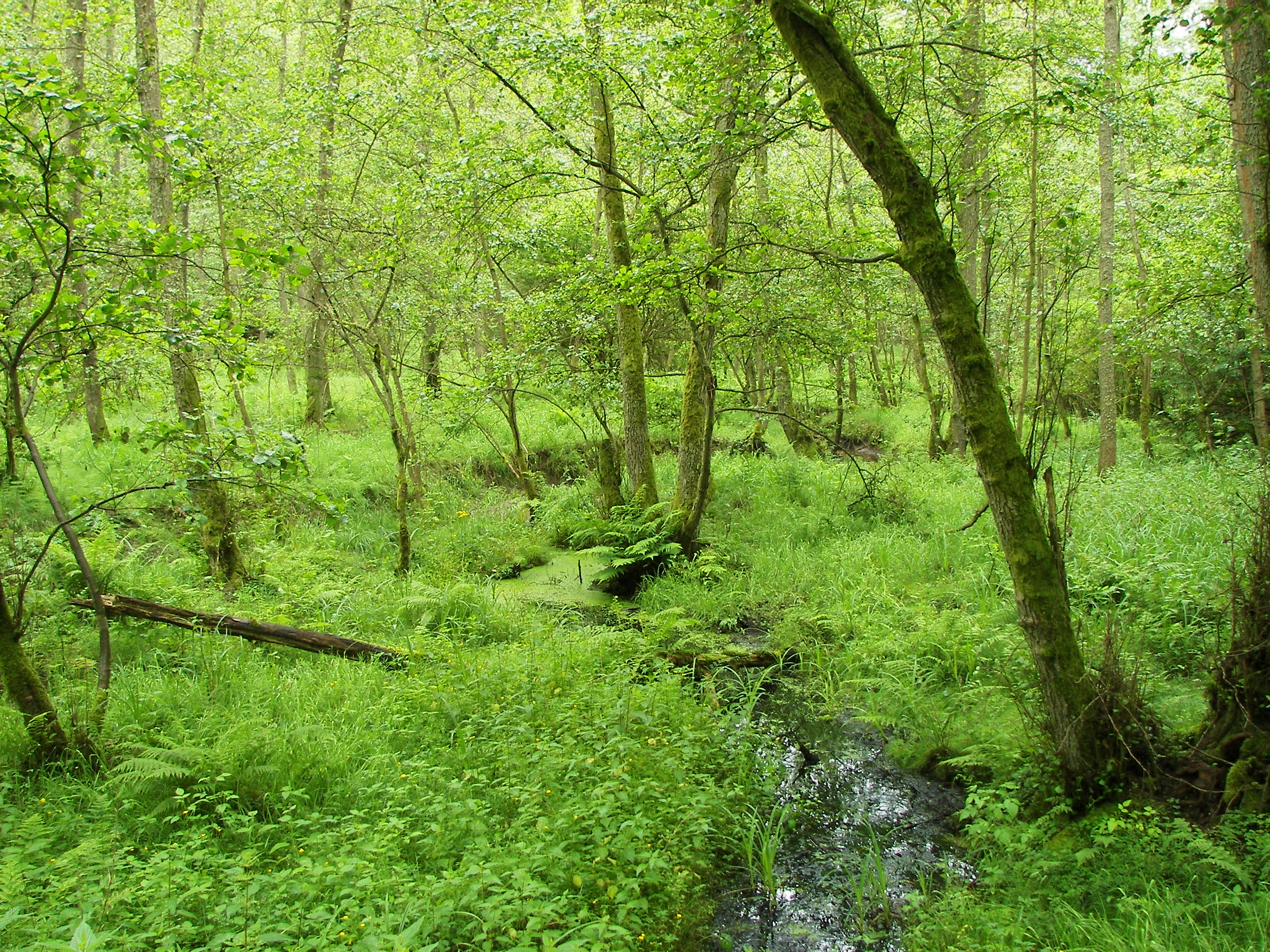 Von Erlen (Alnus glutinosa) geprägter Bruchwaldbereich im Tal des Roten Wassers im Burgwald, Hessen